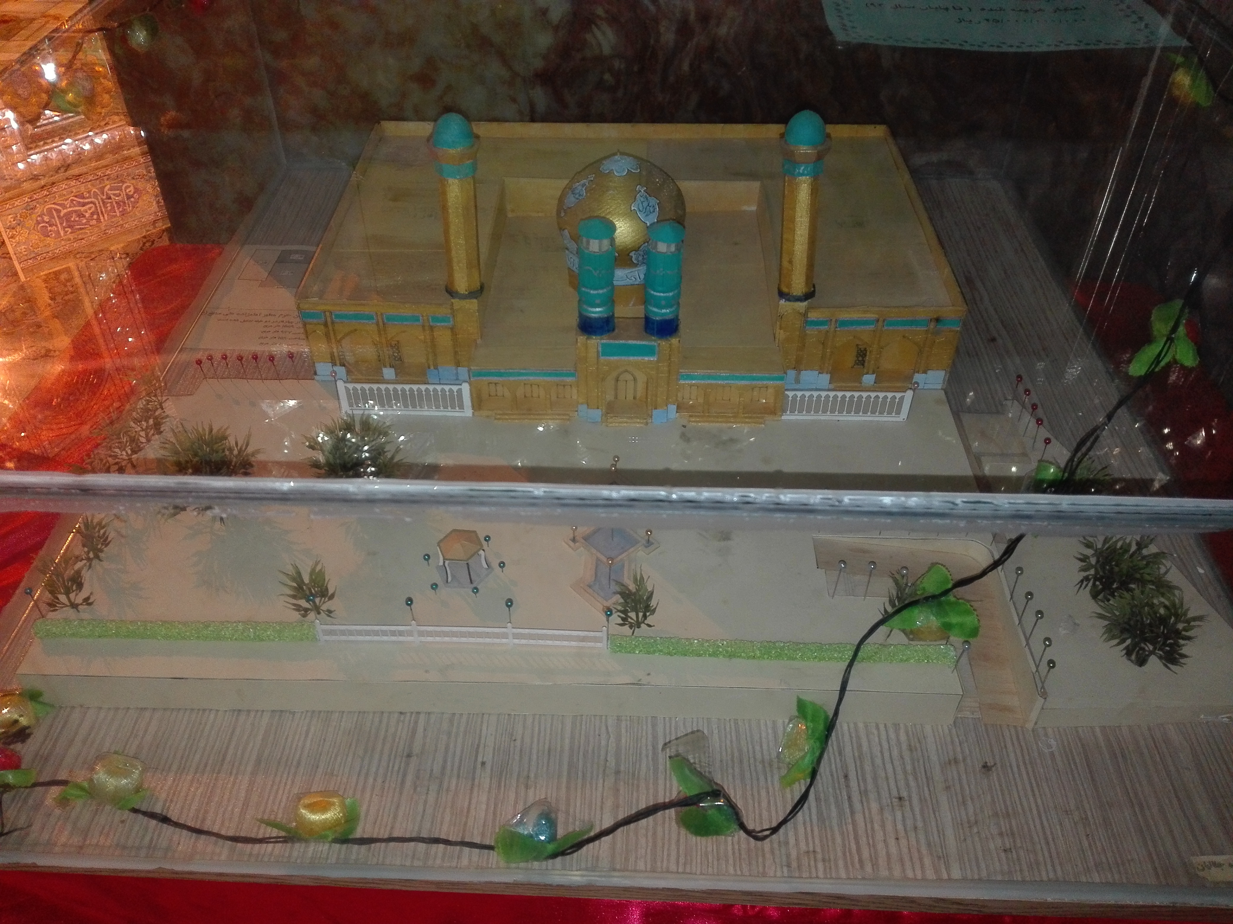 ماکت بارگاه امام زاده علی صالح